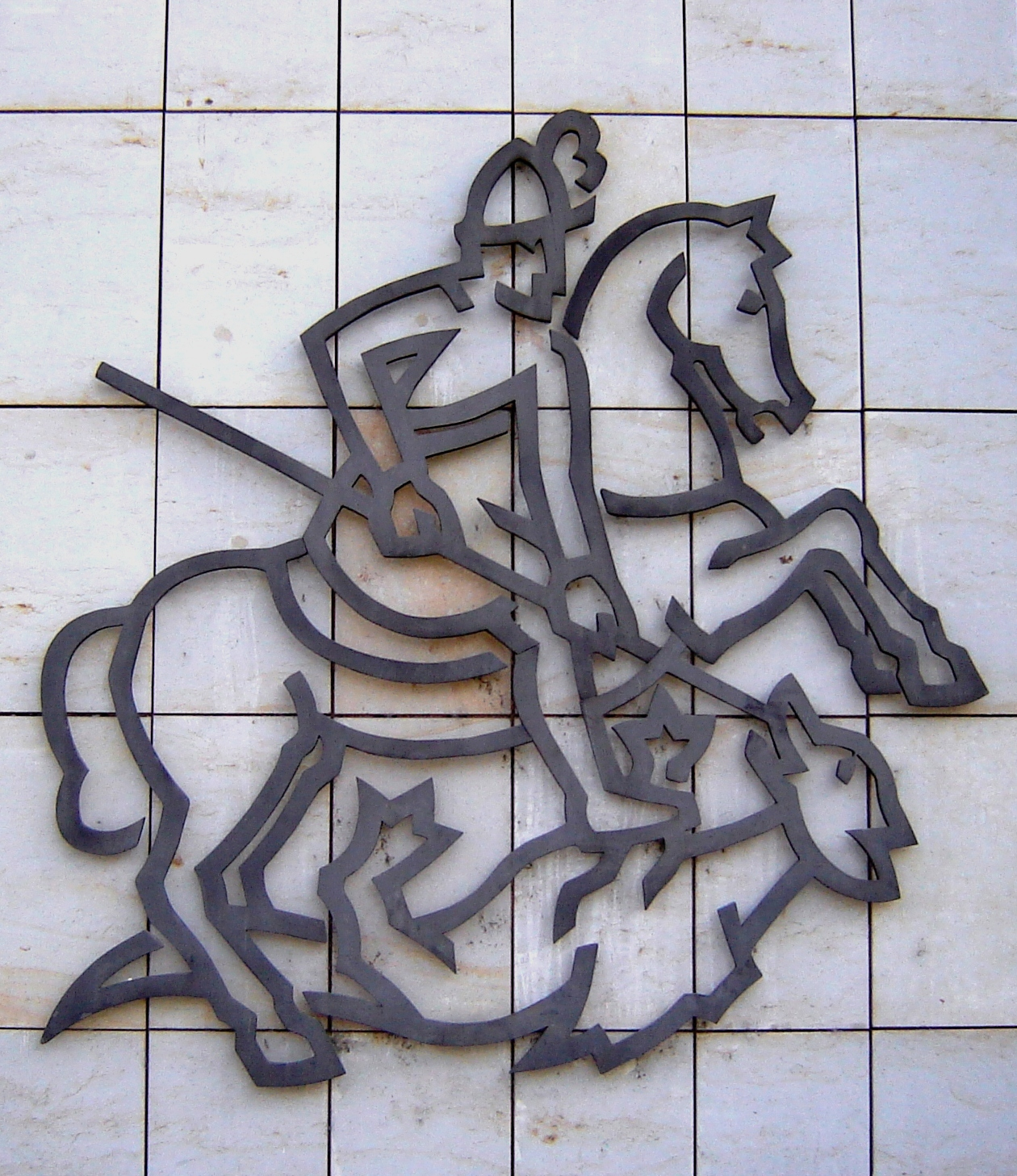 Magdeburg, Skulptur Alter Markt 7 (Kulturdenkmal)